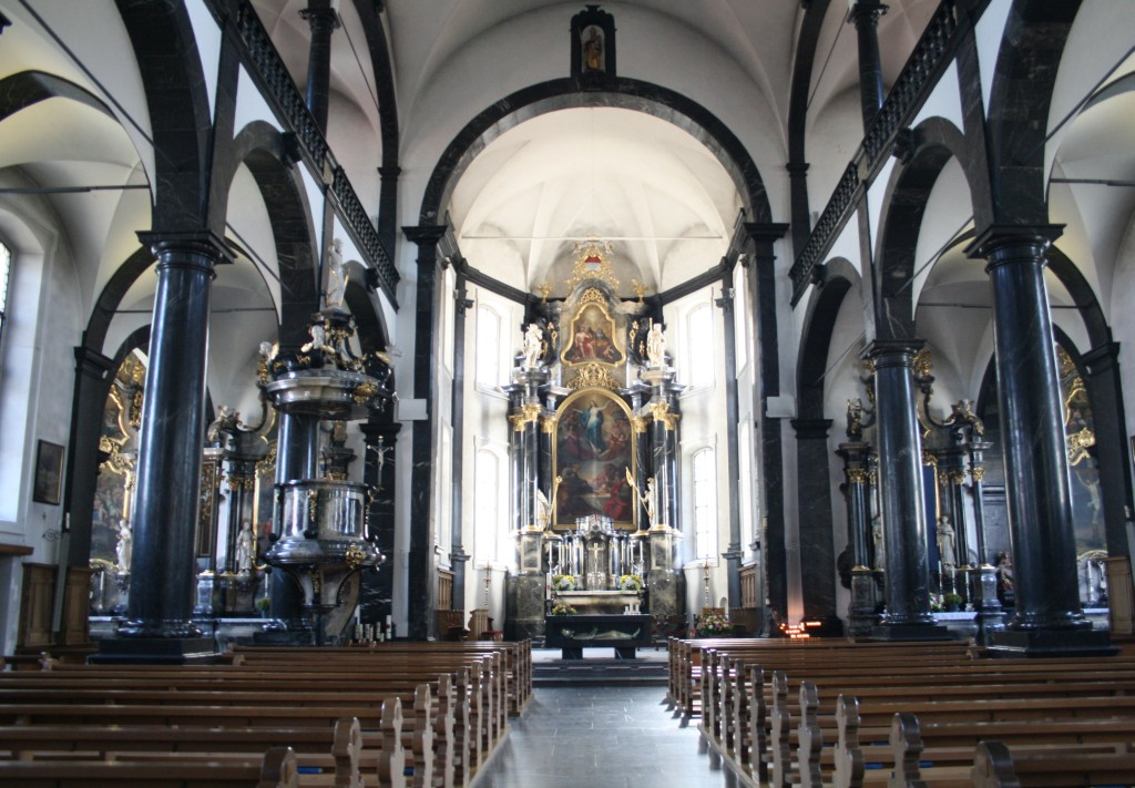 Pfarr- und Wallfahrtskirche Sachseln, Schweiz, Ansicht zum Altarraum